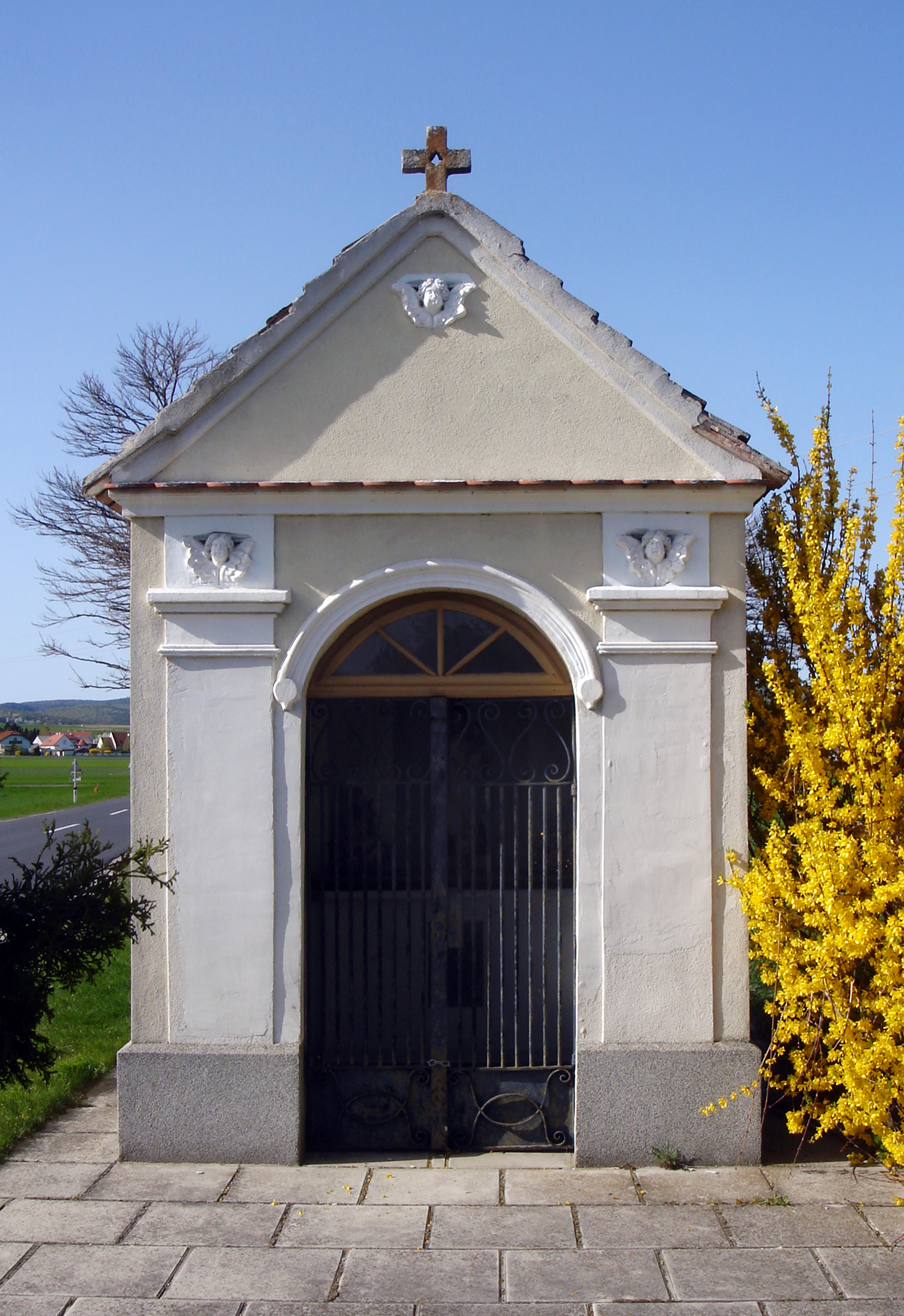 Lackendorf, Marienkapelle (erbaut 1693); auch erwähnt als: Nikloskapelle (erbaut 1883)